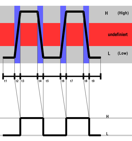 Rechtecksignal (in Rohfassung, wird noch überarbeitet)